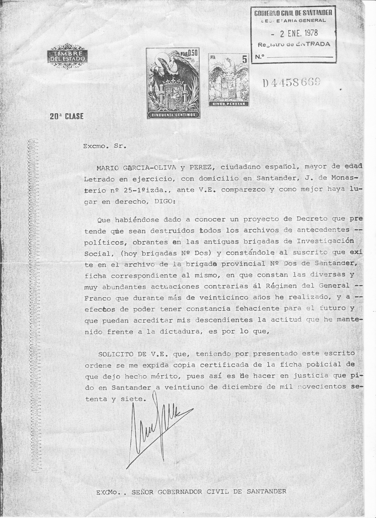 Mario García-Oliva pide que se guarde su ficha policial en un escrito fechado el 2 de enero de 1978